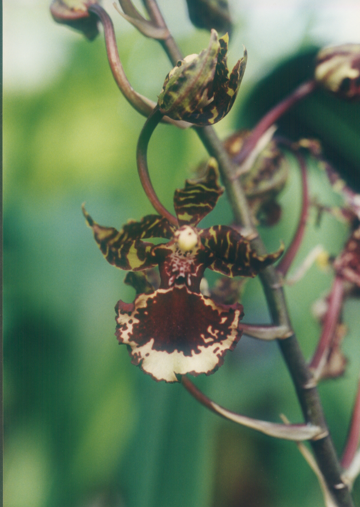 Odontocidium Everglades Elegance Nancy Lee